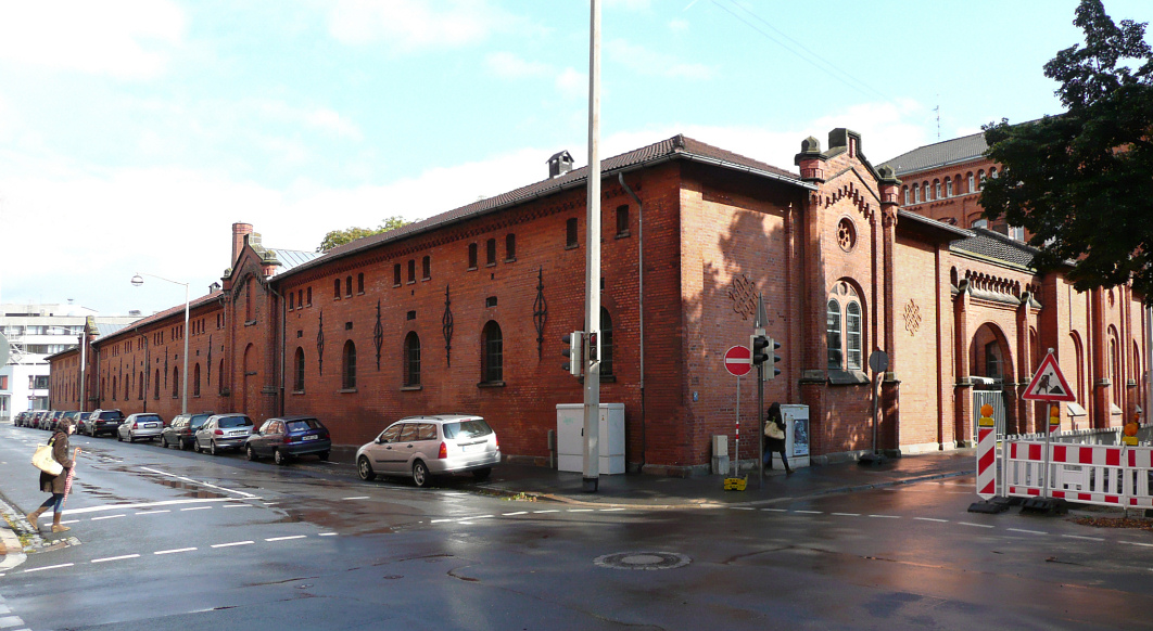 Stall der Reiterstaffel Hannover